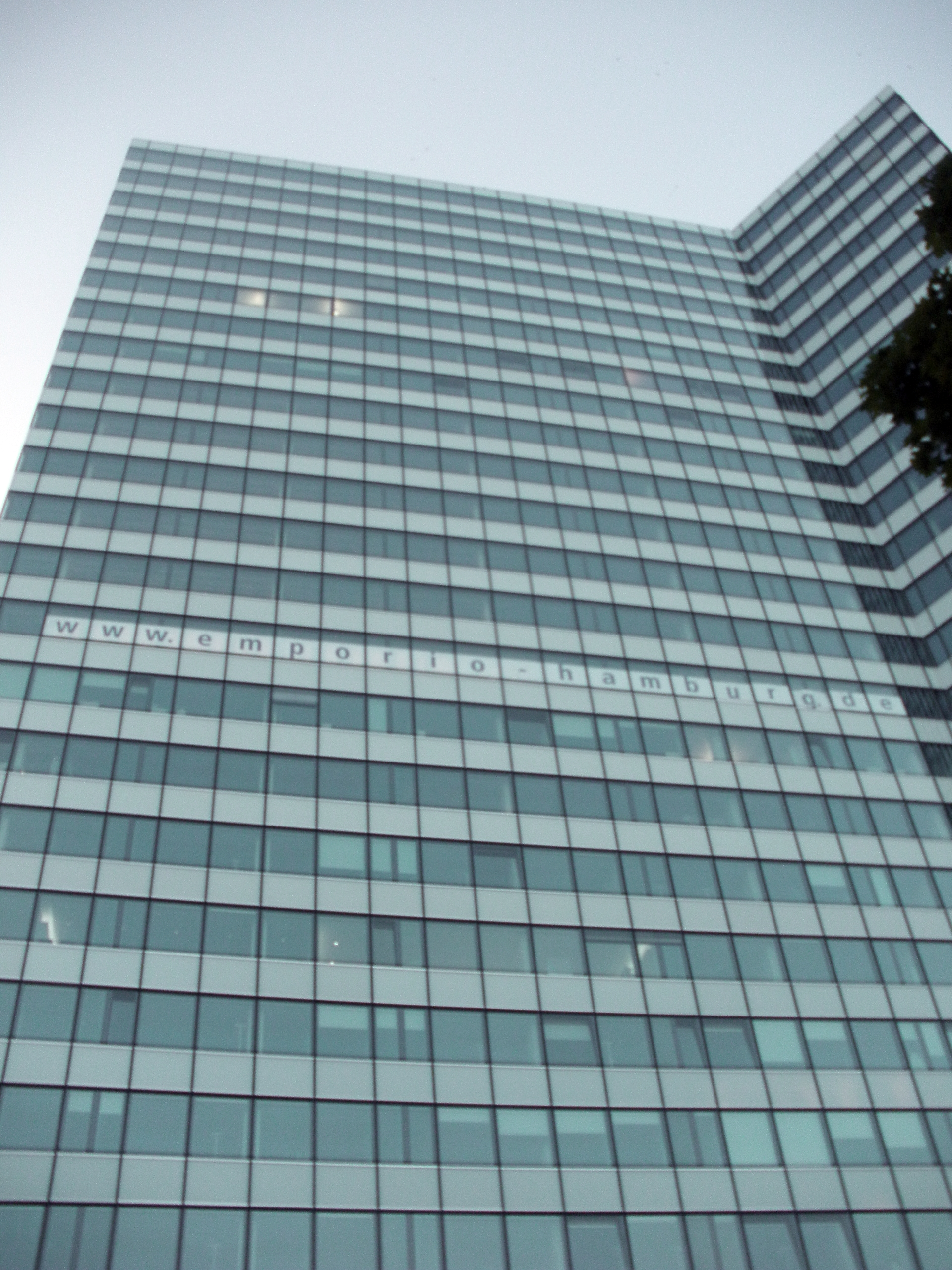 fassade des emporio hauses hamburg neustadt, ehemals unilever